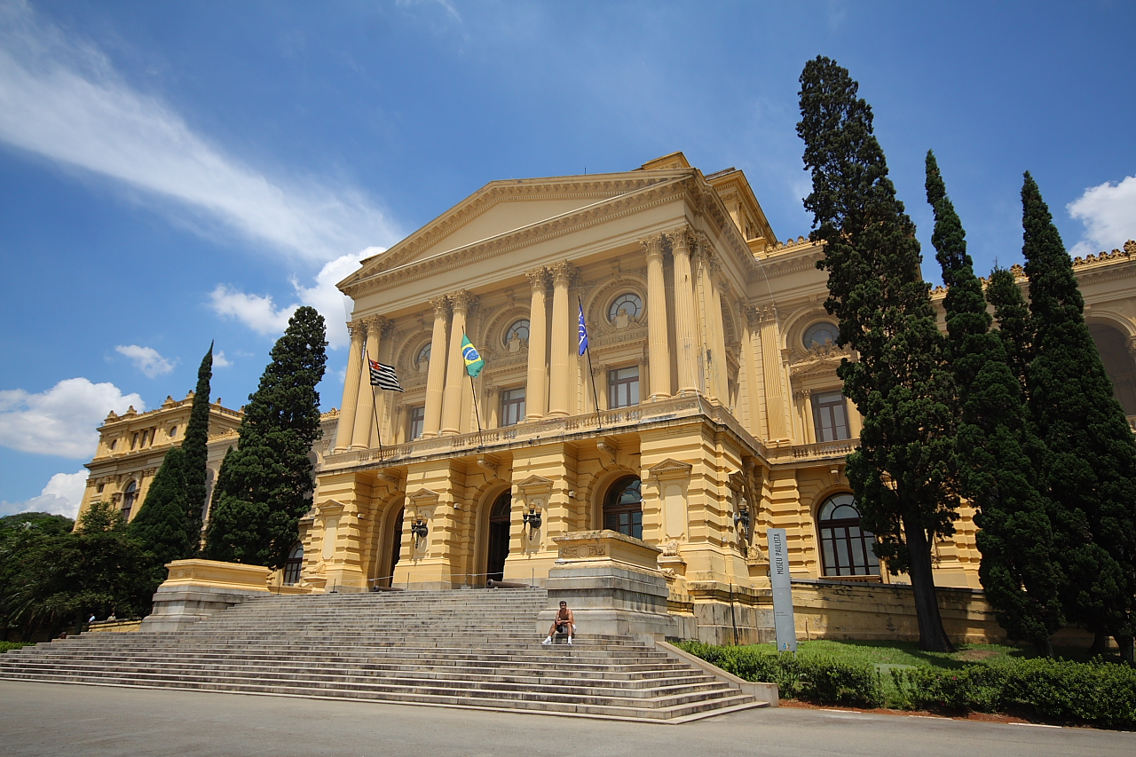 Museu do Ipiranga, São Paulo, Brasil.